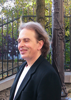 Portrait de Jacques Vaillant, chanteur de variétés français